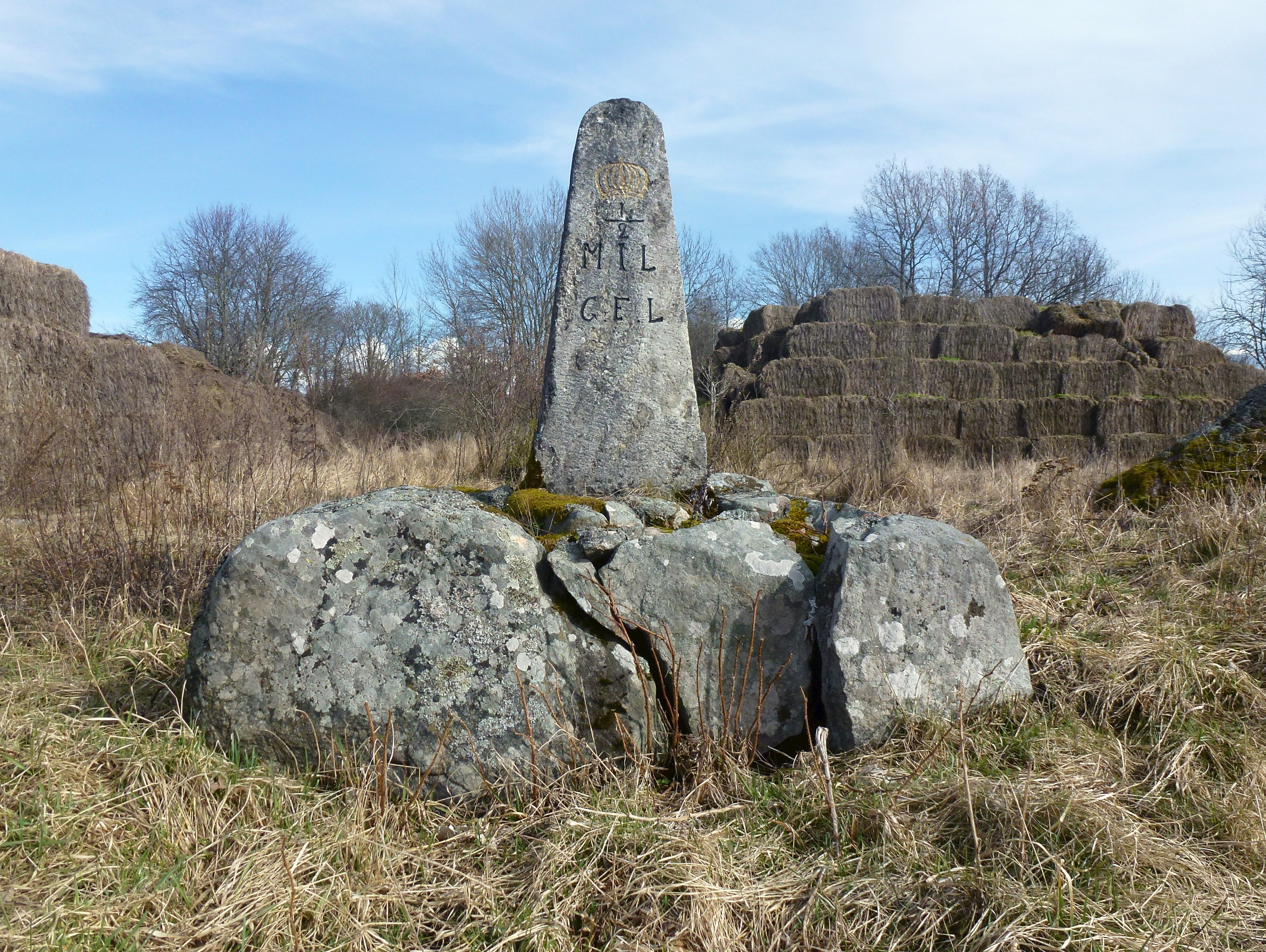 Milsten vid gamla Färentunavägen intill Skå-Edeby flygfält, RAÄ-nummer Skå 42:1